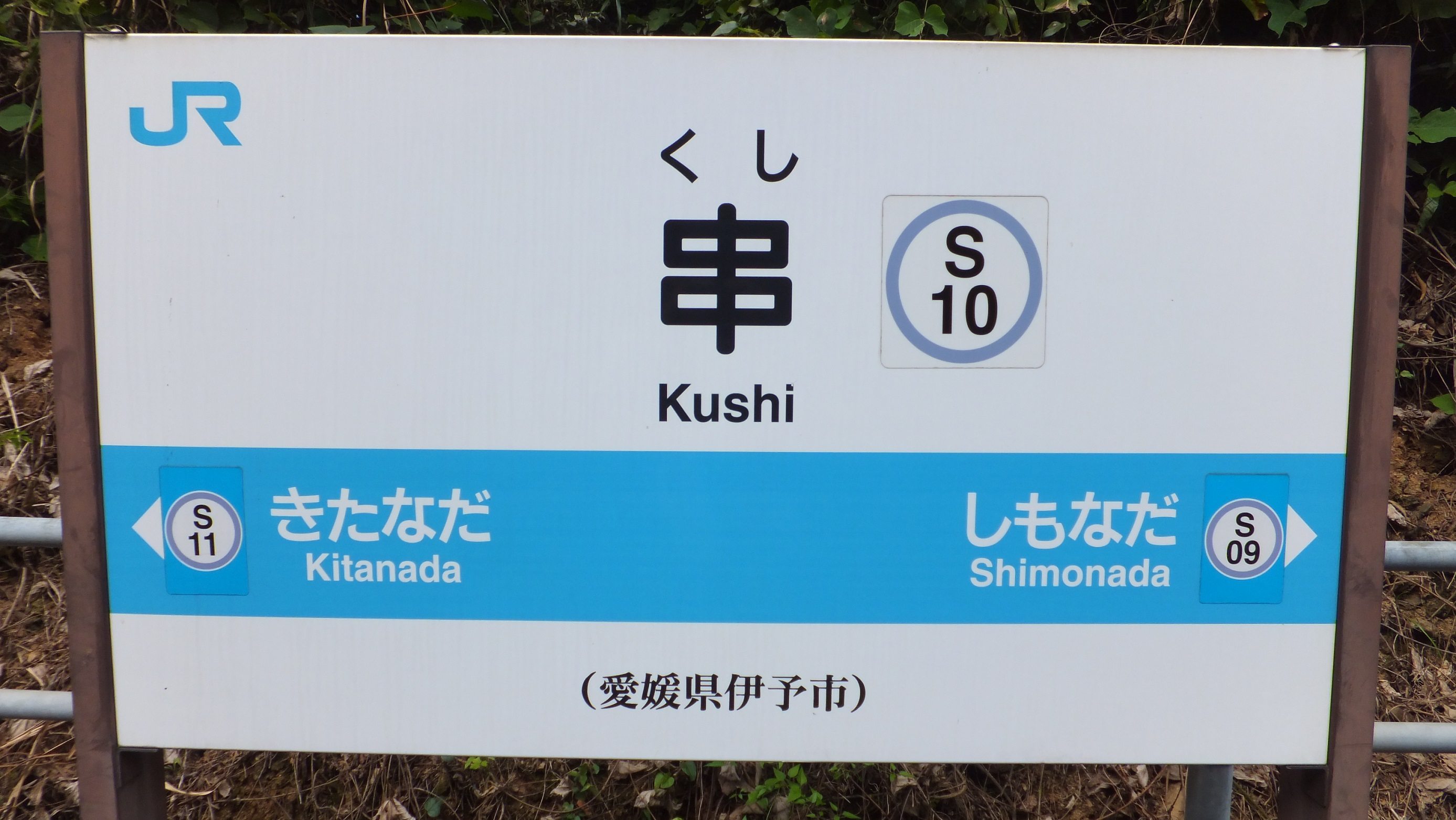 JR四国 予讃線（愛ある伊予灘線）串駅（2015年10月 愛媛県伊予市）